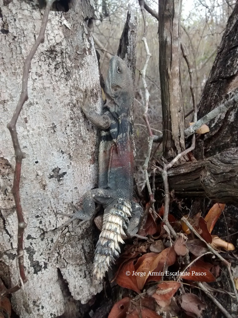 Ctenosaura defensor, Yucatán, Mexico.